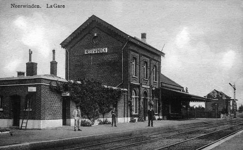 L'intérieur de la gare avec le bâtiment les voies et les quais au début des années 1900?